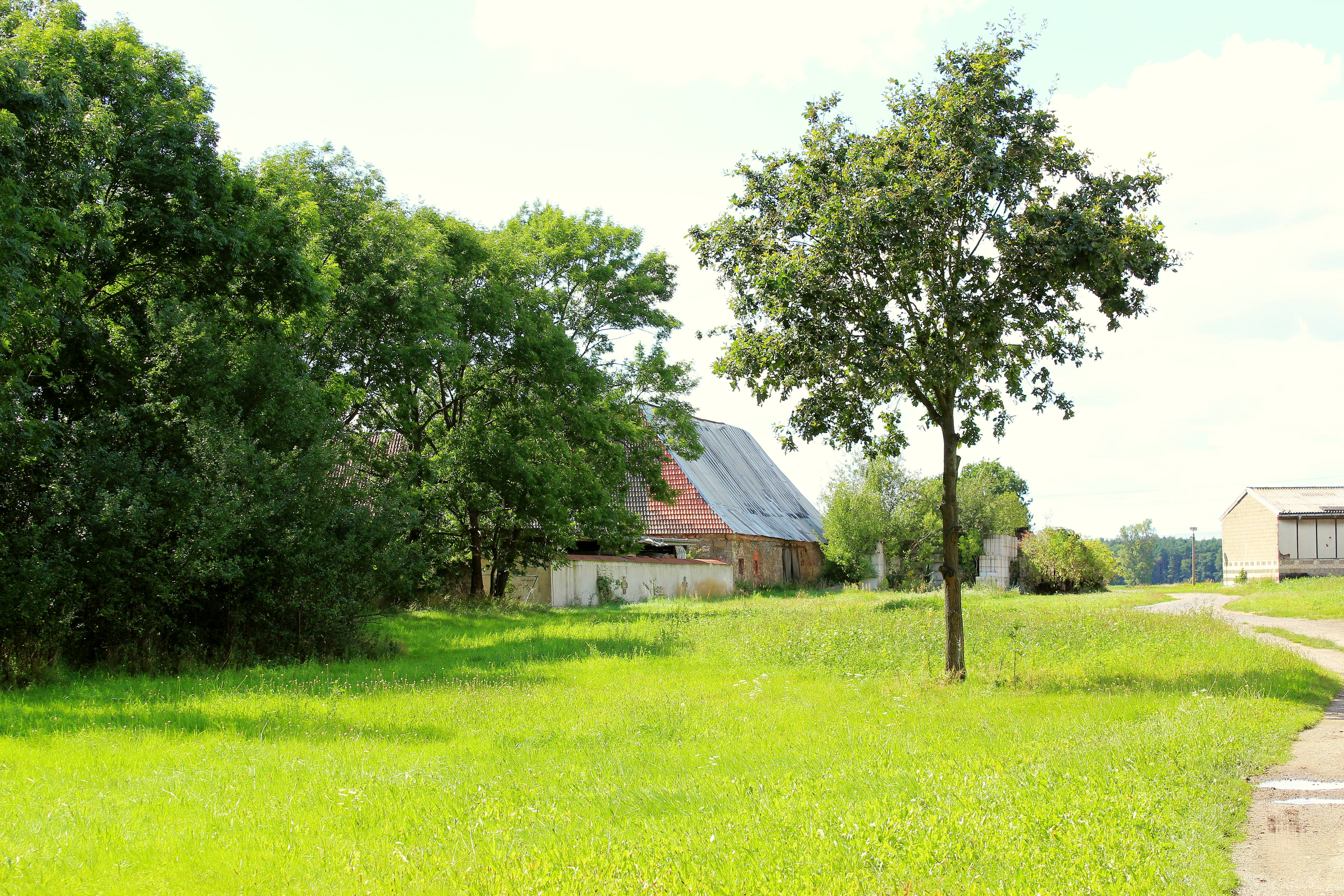 Alte Schäferei am